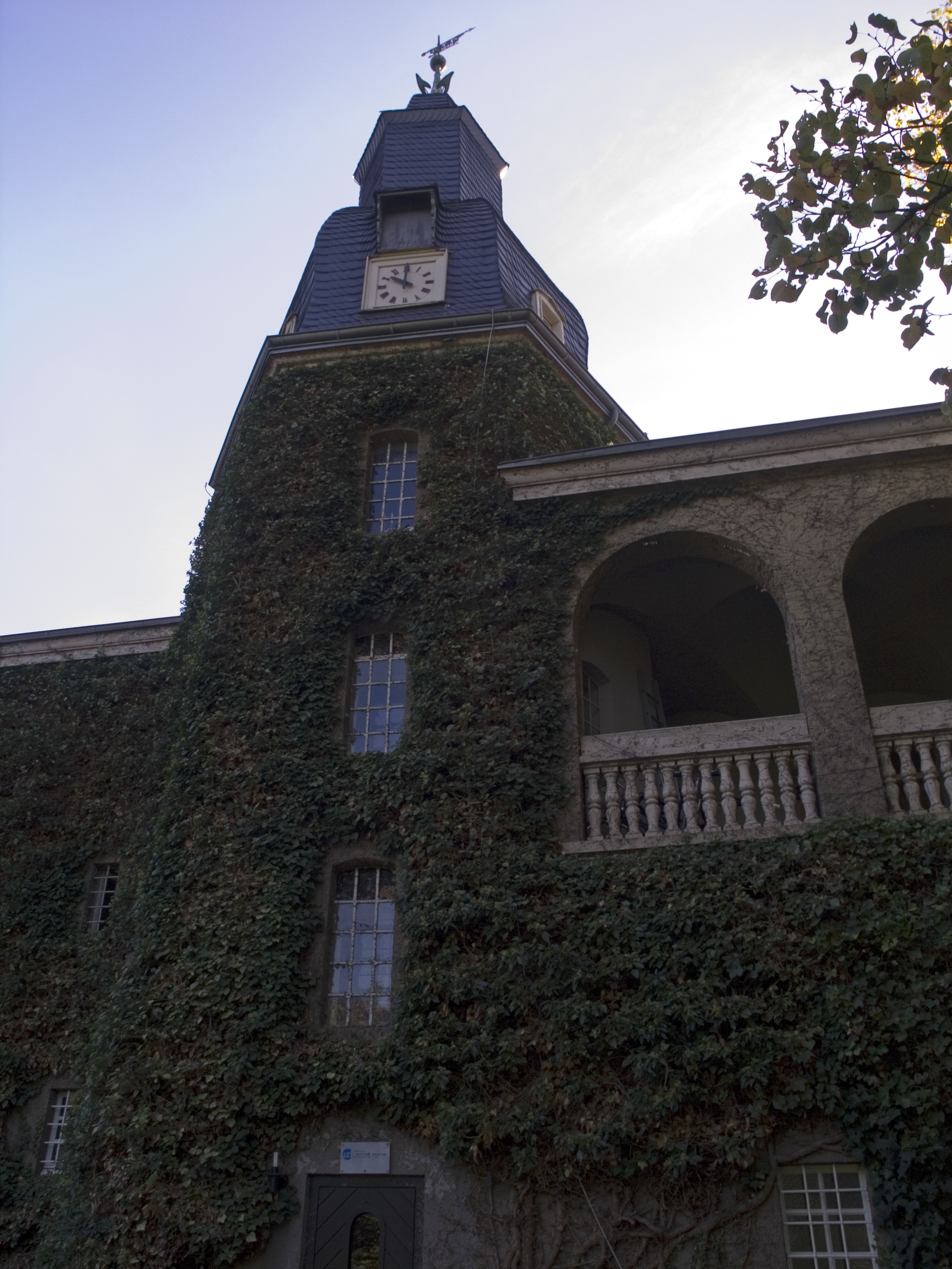 Северный Рейн-Вестфалия, Мюльхайм-на-Руре - замок Штюрум